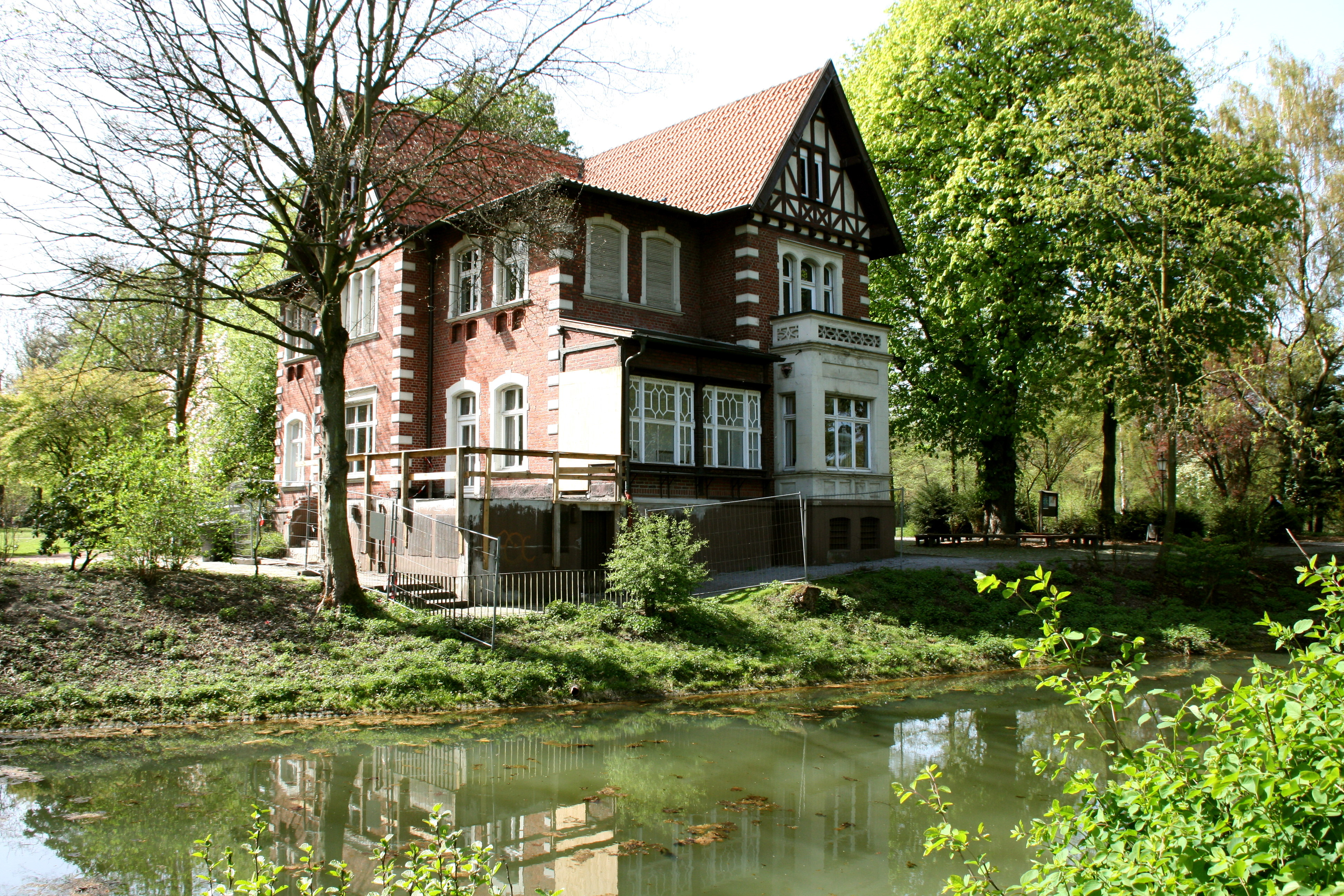 Städtische Galerie in der Villa Forell, Karl-Brandt-Weg 2, Schlosspark Strünkede in Herne